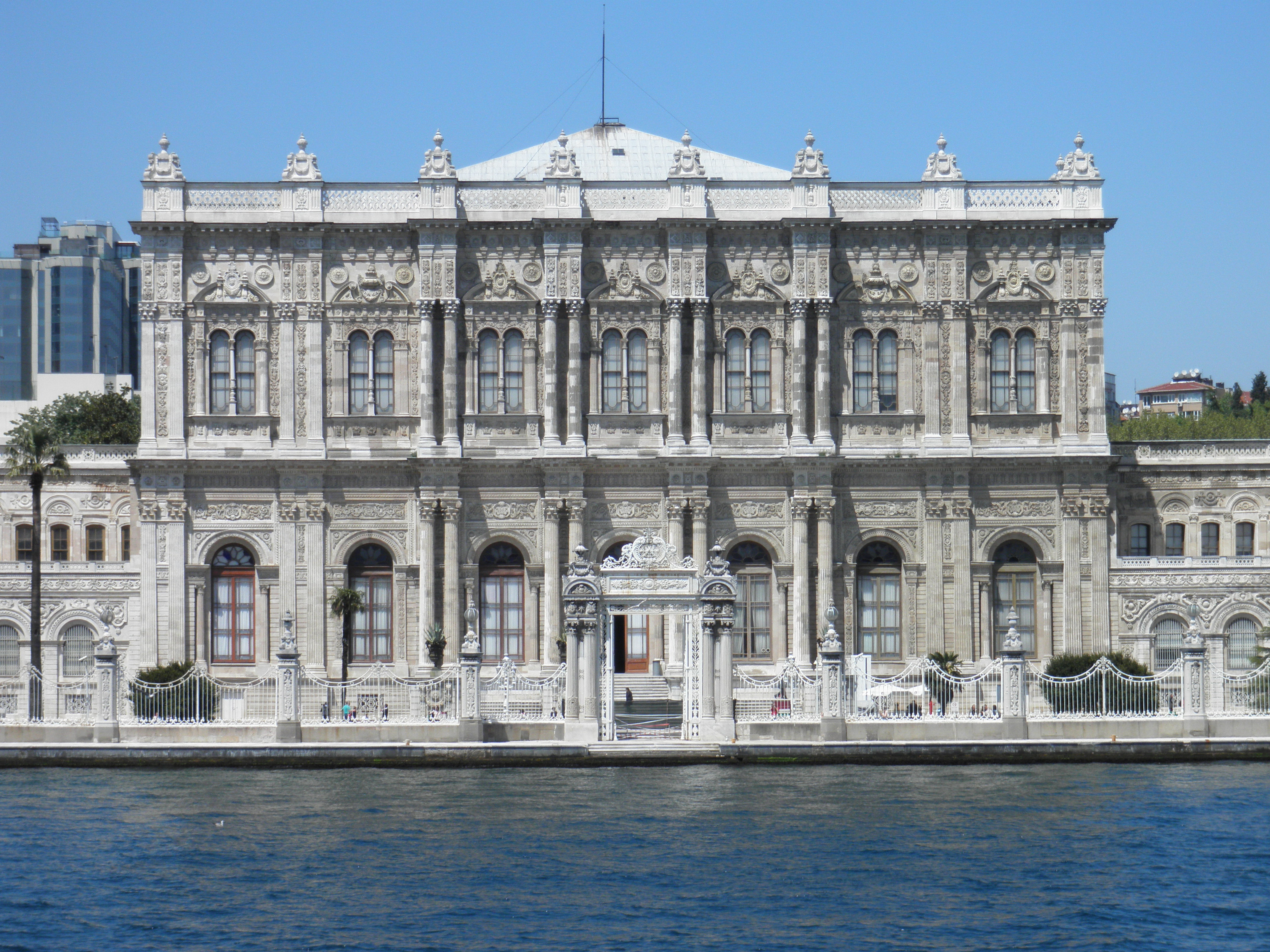 Dolmabahçe Sarayı